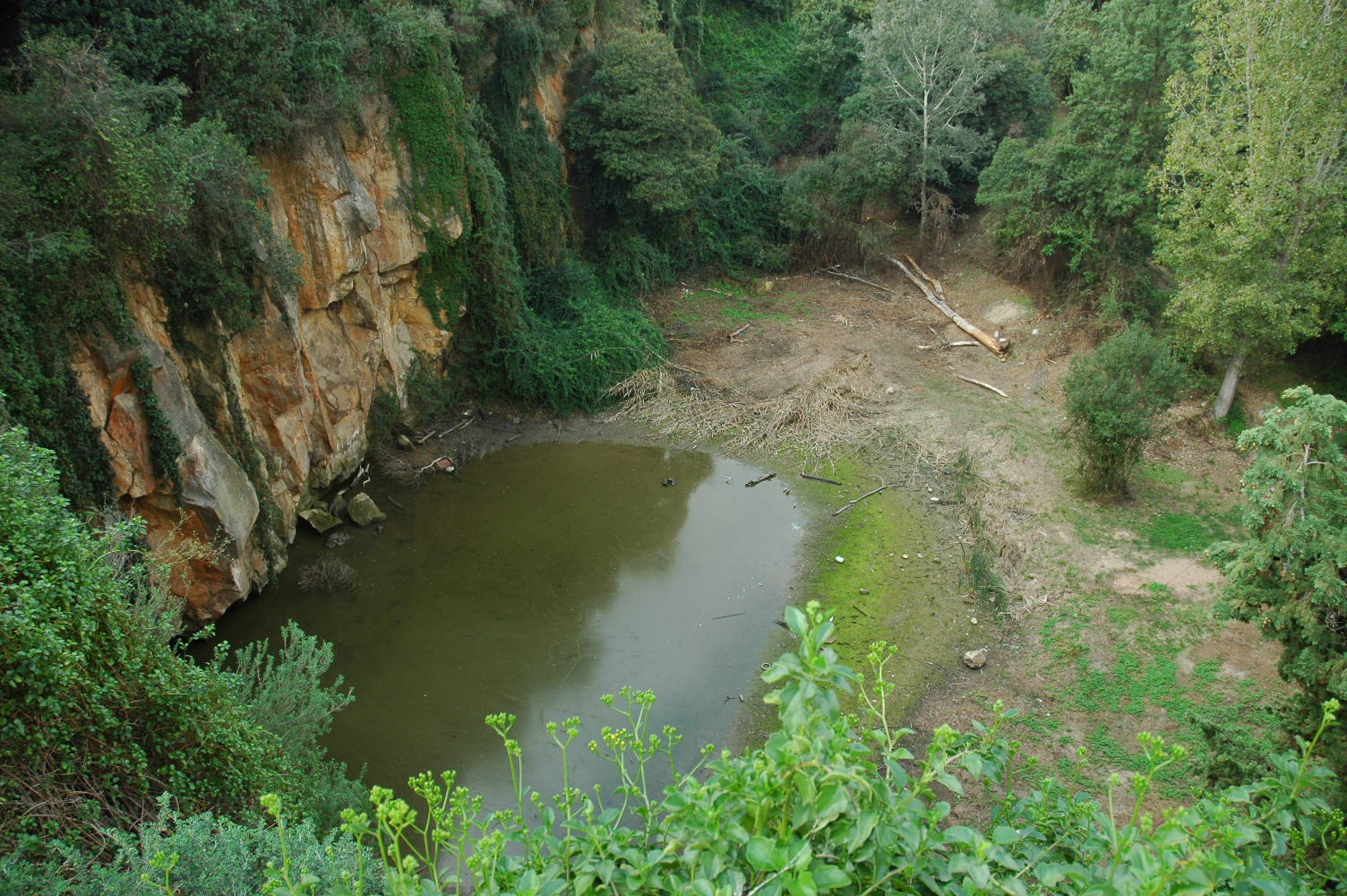 2012-Montjuic. Sot o Cantera de La Foixarda. És una cantera ja aturada de la que es varen extreure materials per a la construcció de edificis de tot ordre a Barcelona.